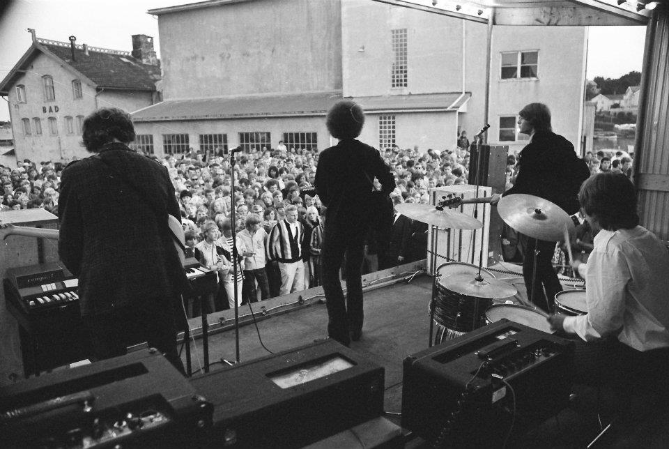 The Pussycats i Grimstad 1967. Et av de mest innflytelsesrike bandene på 60-tallet, The Pussycats, fra en konsert i Grimstad juli 1967. Pussycats ble dannet i Tromsø i 1964. De ga i 1966 ut to album Psst! Psst! og Mrr…Mrr…, som begge ble en suksess. Sten Ekroth var gruppas manager i ”storhetsdagene” og ble kjent for sin kreative markedsføring og uvanlige stunts for å få gruppen fram i lyset. Han gjorde at gruppen ble valgt som oppvarmere til Rolling Stones’ Nordenturne i 1965, der de bl.a. opptrådte i Sjølysthallen. Pussycats medvirket senere på Ole Paus’ Garman og ga ut to plater som ikke nådde helt opp. Etter flere mannskapsendringer ble gruppa oppløst i 1973.